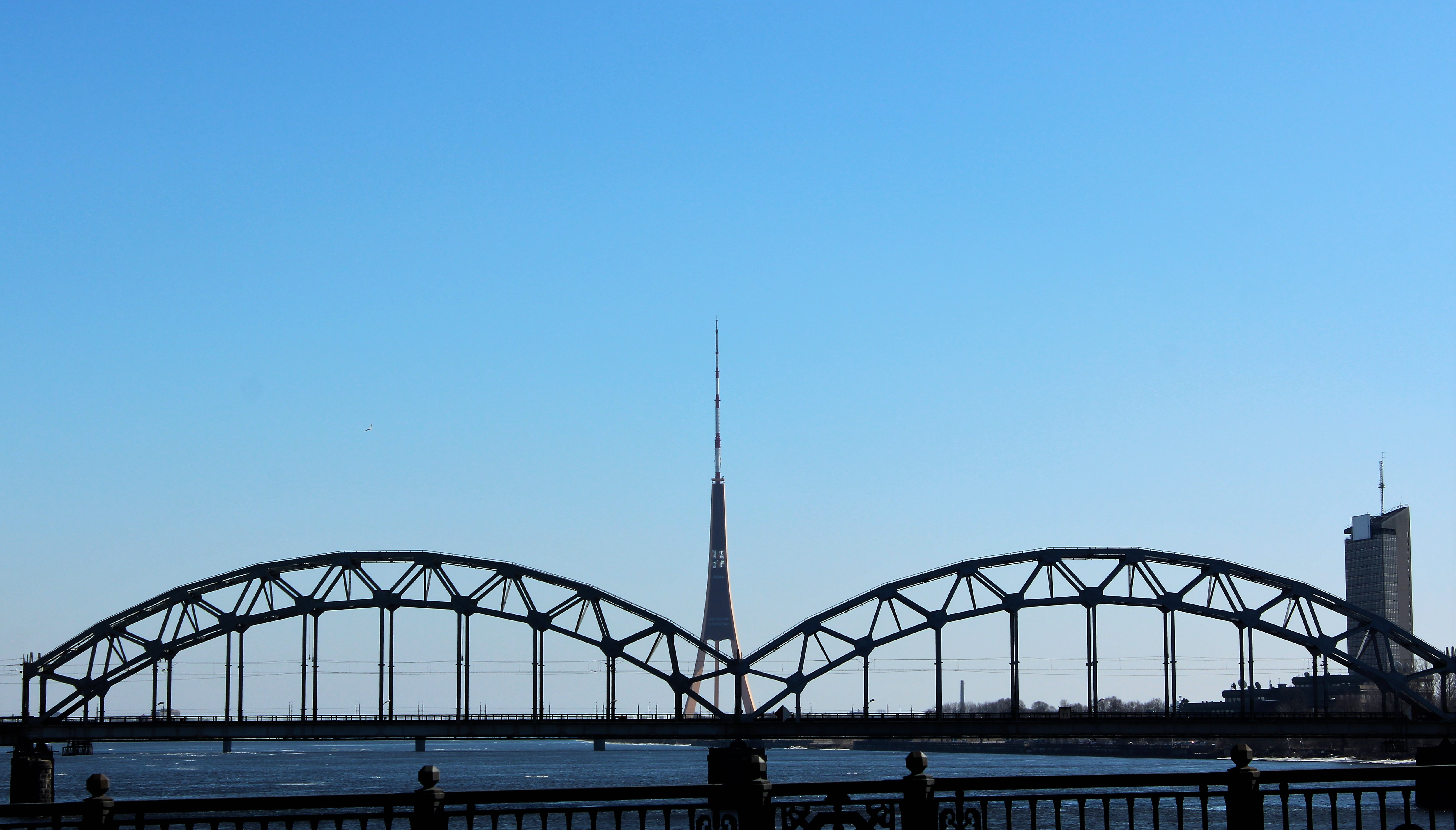 Väinäjoen yli johtava rautatiesilta (latv. Dzelzceļa tilts). Taustalla 368,5 metriä korkea Riian radio- ja televisiotorni.